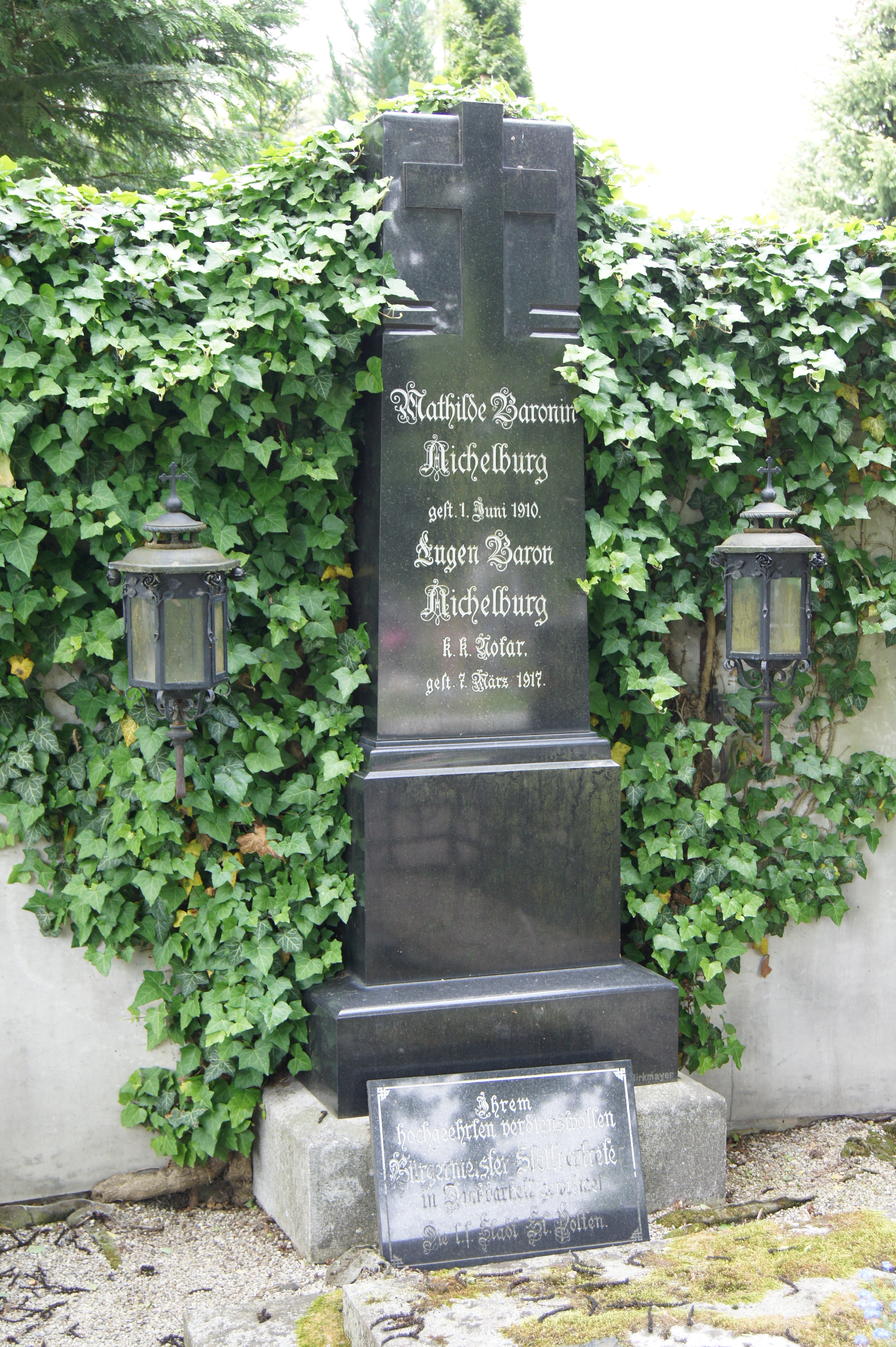 Städtischer Hauptfriedhof, Aichelburggrab